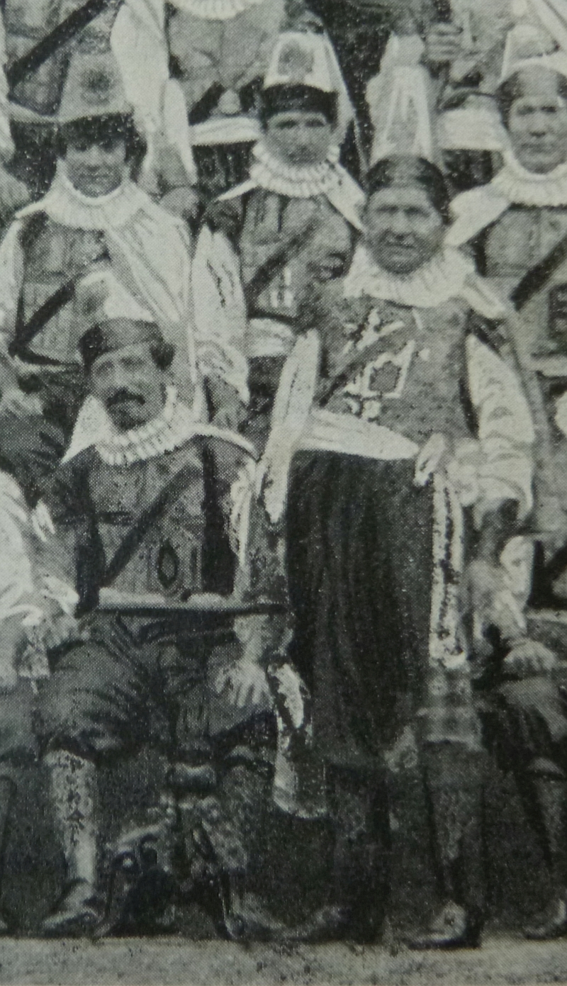 Portrait de Nicolas Jomouton assis à droite de Nicolas Bosret. Scan d'un détail d'une photogravure reproduisant une photographie du groupe des Molons de la royale Moncrabeau. La photographie reproduite date d'avant 1876 (mort de Nicolas Bosret) et d'avant 1865 selon Jacques Godenne qui la publie en 1901 (Source : Jacques Godenne, Royale Moncrabeau. Les 40 Molons namurois (extrait de La Province de Namur Pittoresque, Monumentale, Artistique et Historique), Namur, Jacques Godenne, 1901, p. 44.